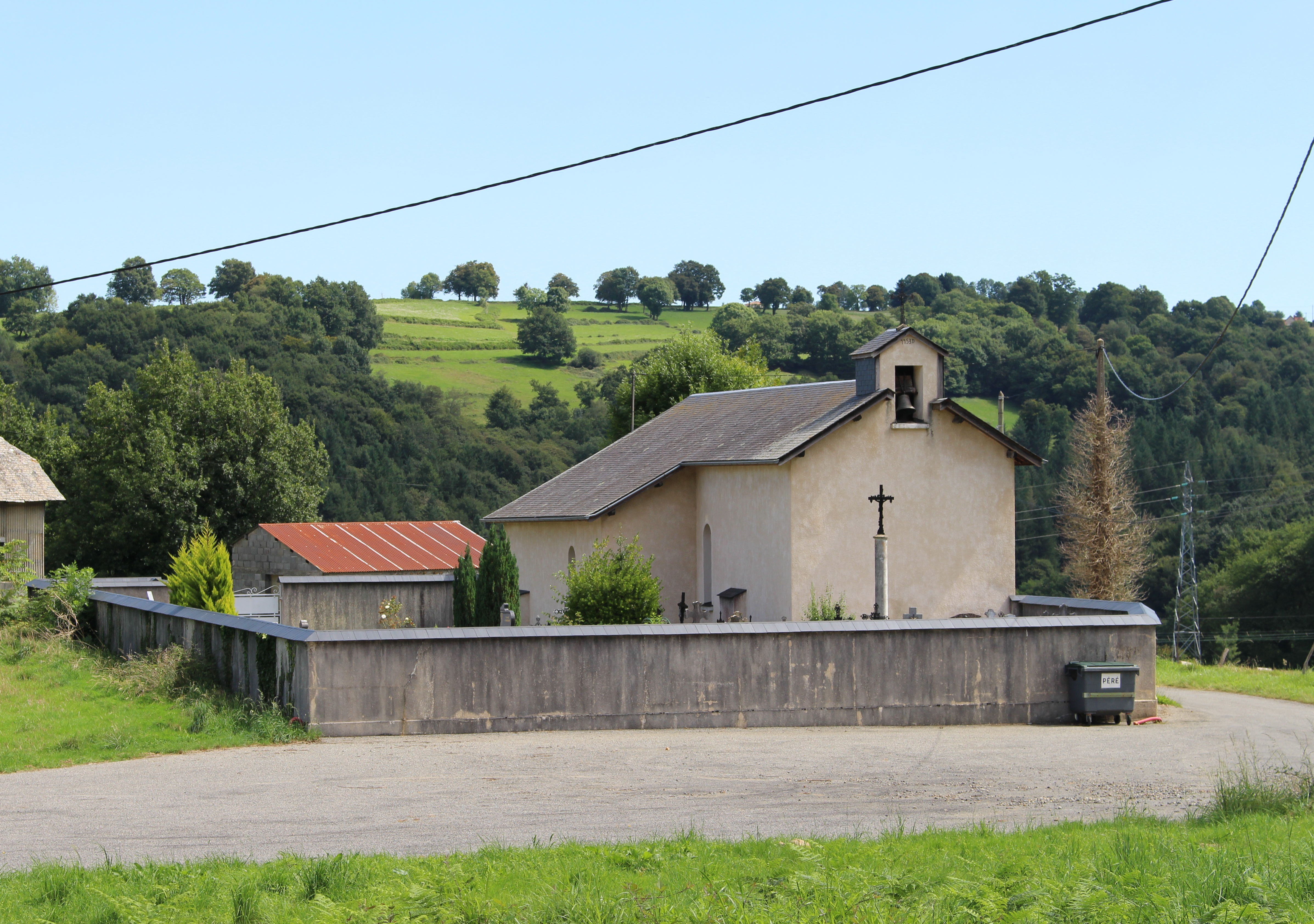 Église de la Nativité-de-la-Sainte-Vierge de Péré (Hautes-Pyrénées)